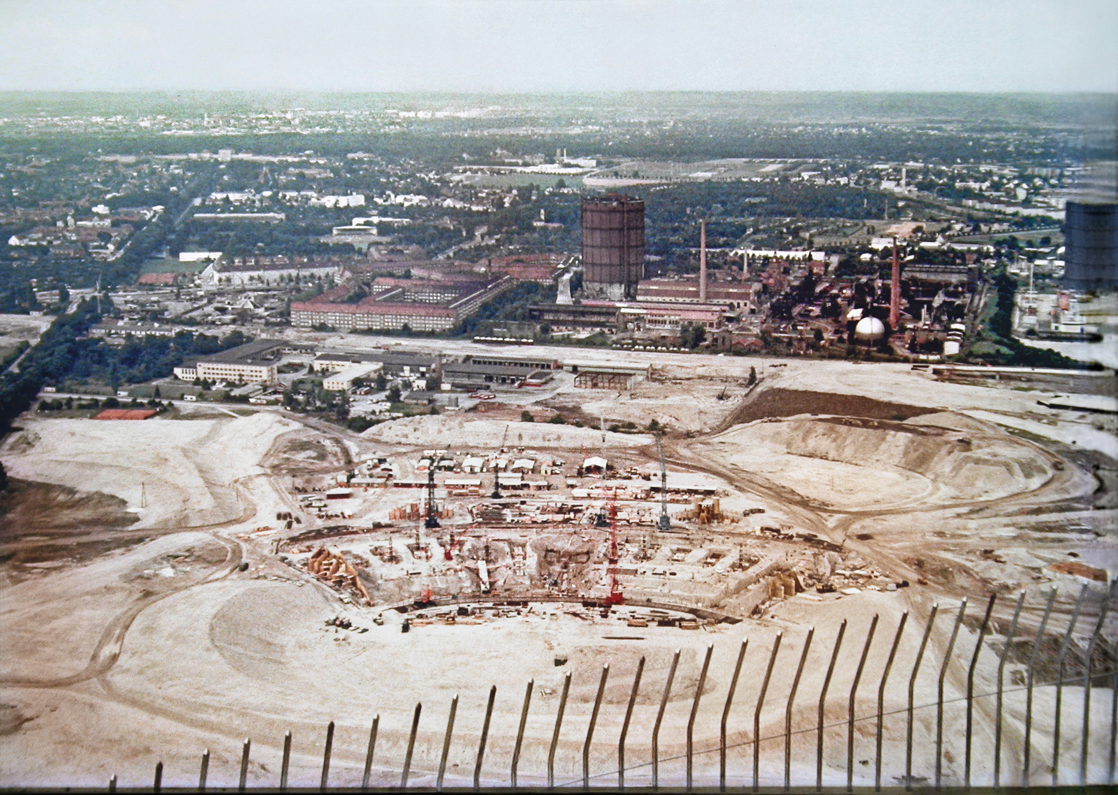 1969 - Baustelle Olympiastadion